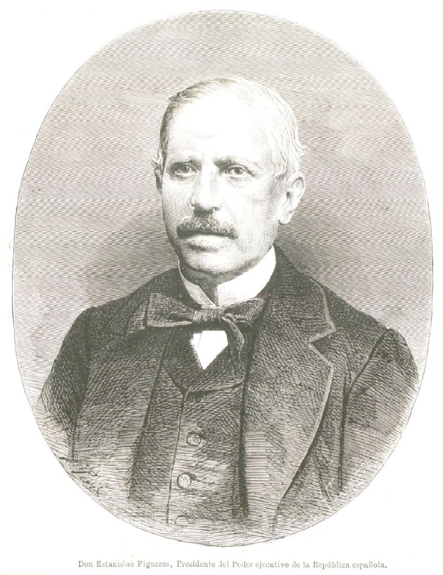 Xilografía de Estanislao Figueras, presidente del Poder Ejecutivo de la República española.